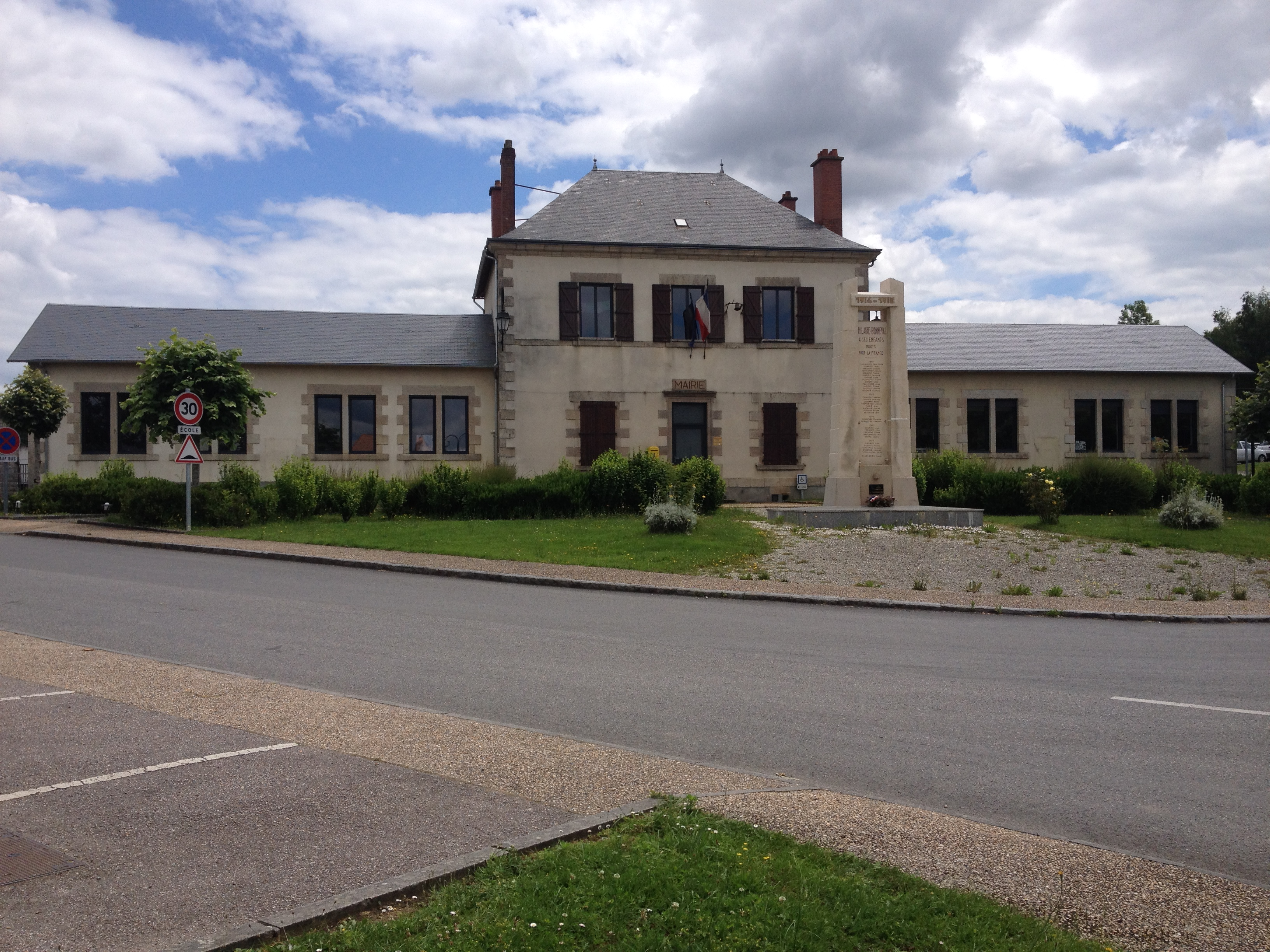 La mairie de Saint-Hilaire-Bonneval et son monument aux morts de la première guerre mondiale.